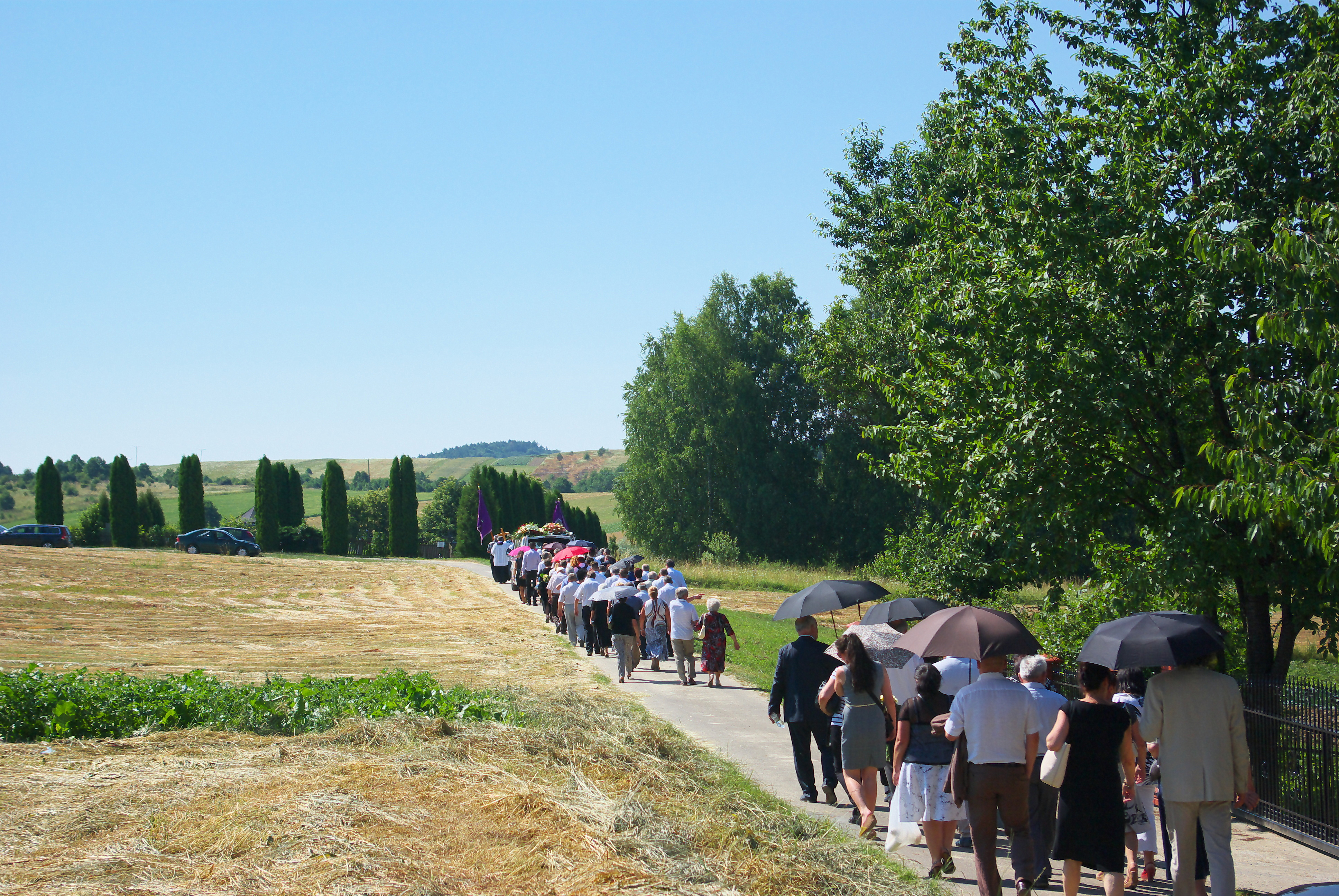 Pogrzeb Zygmunt Haduch-Suskiego 5 lipca 2015 w Płowcach.